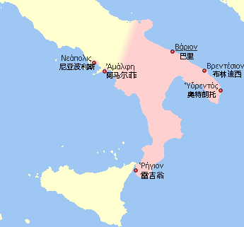 11世纪早期的意大利督军区